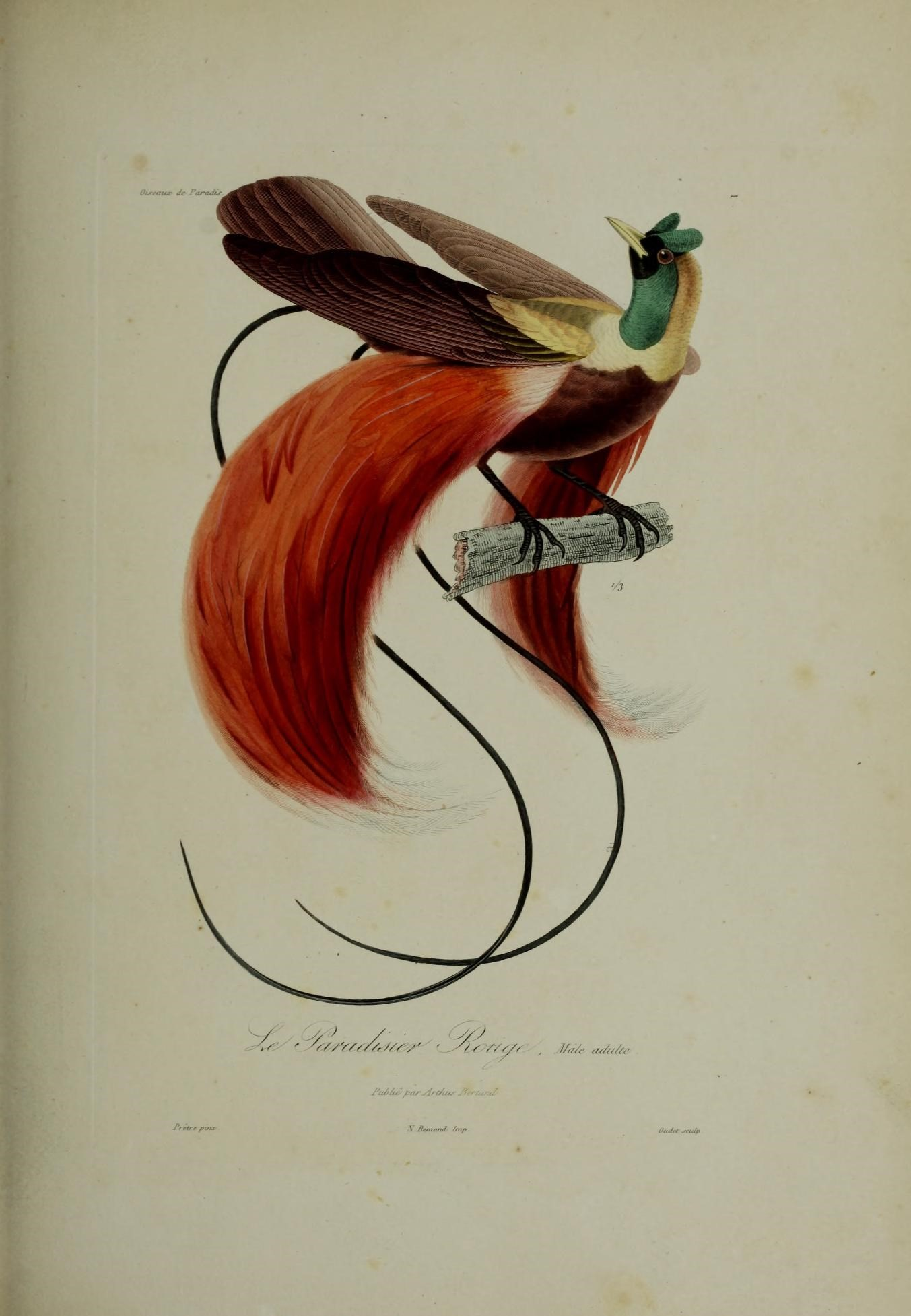 ÛMimj- de -Paradis.